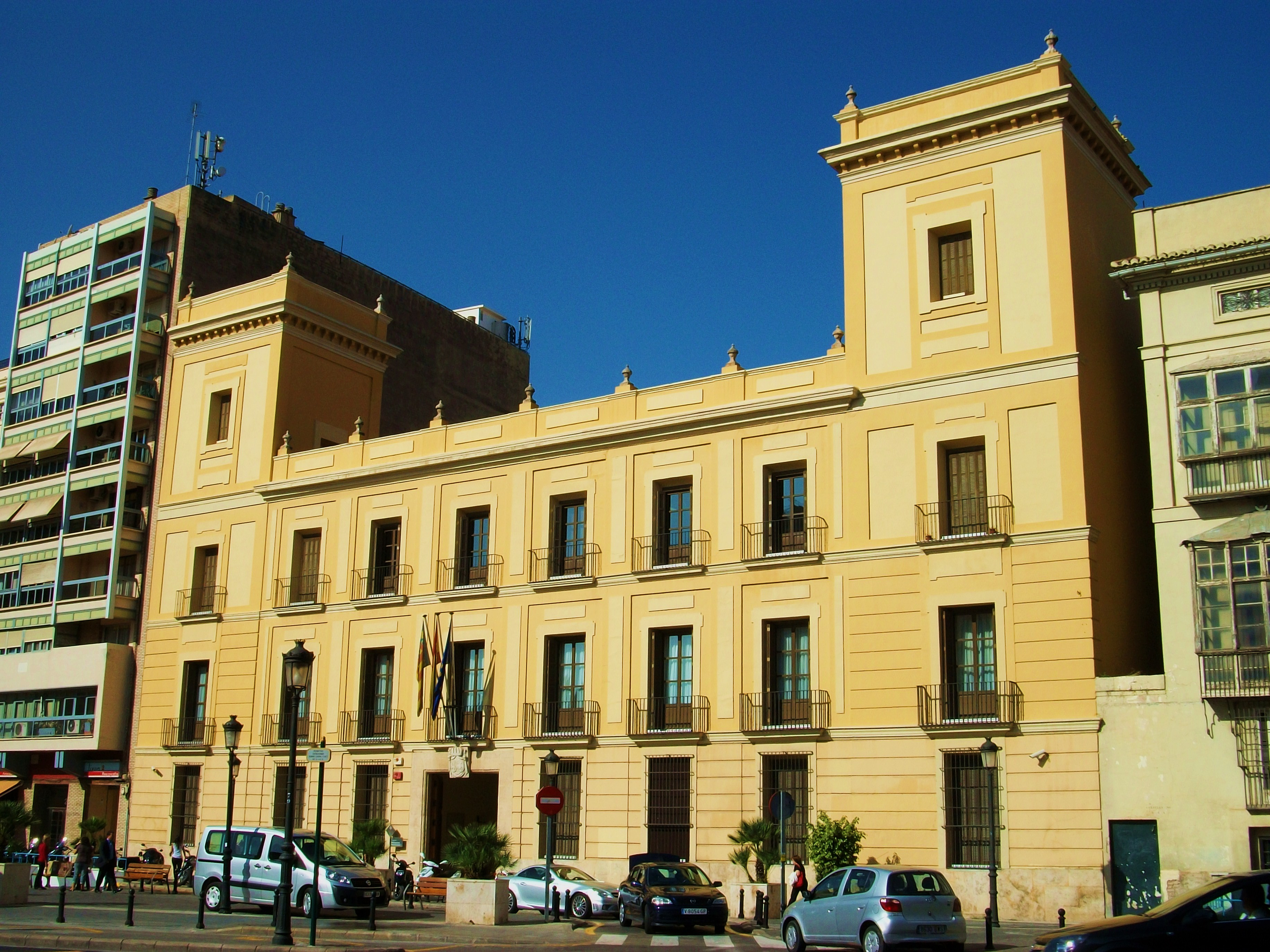 Palau de Cervelló de València.